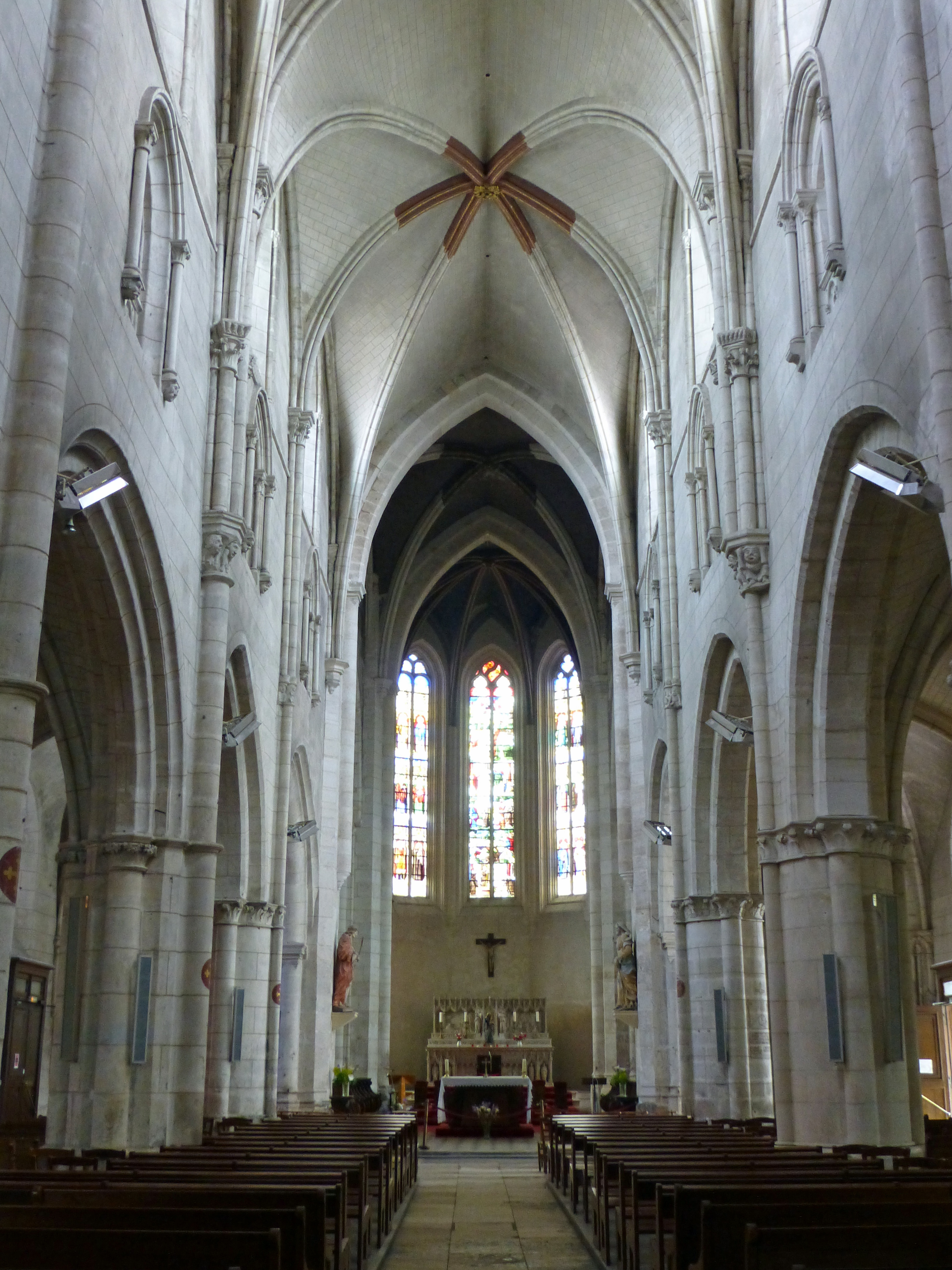 Aubigny-sur-Nère (Cher) : église Saint-Martin